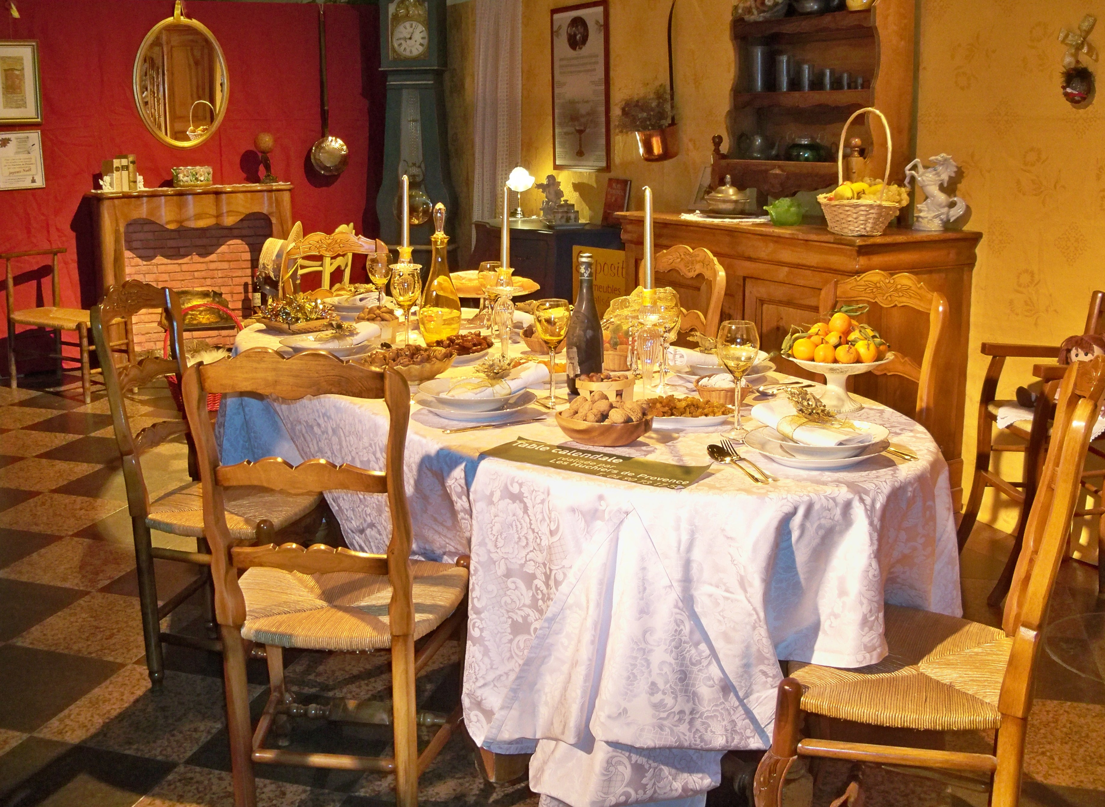 Table du Gros Souper de Noël, tradition provençale